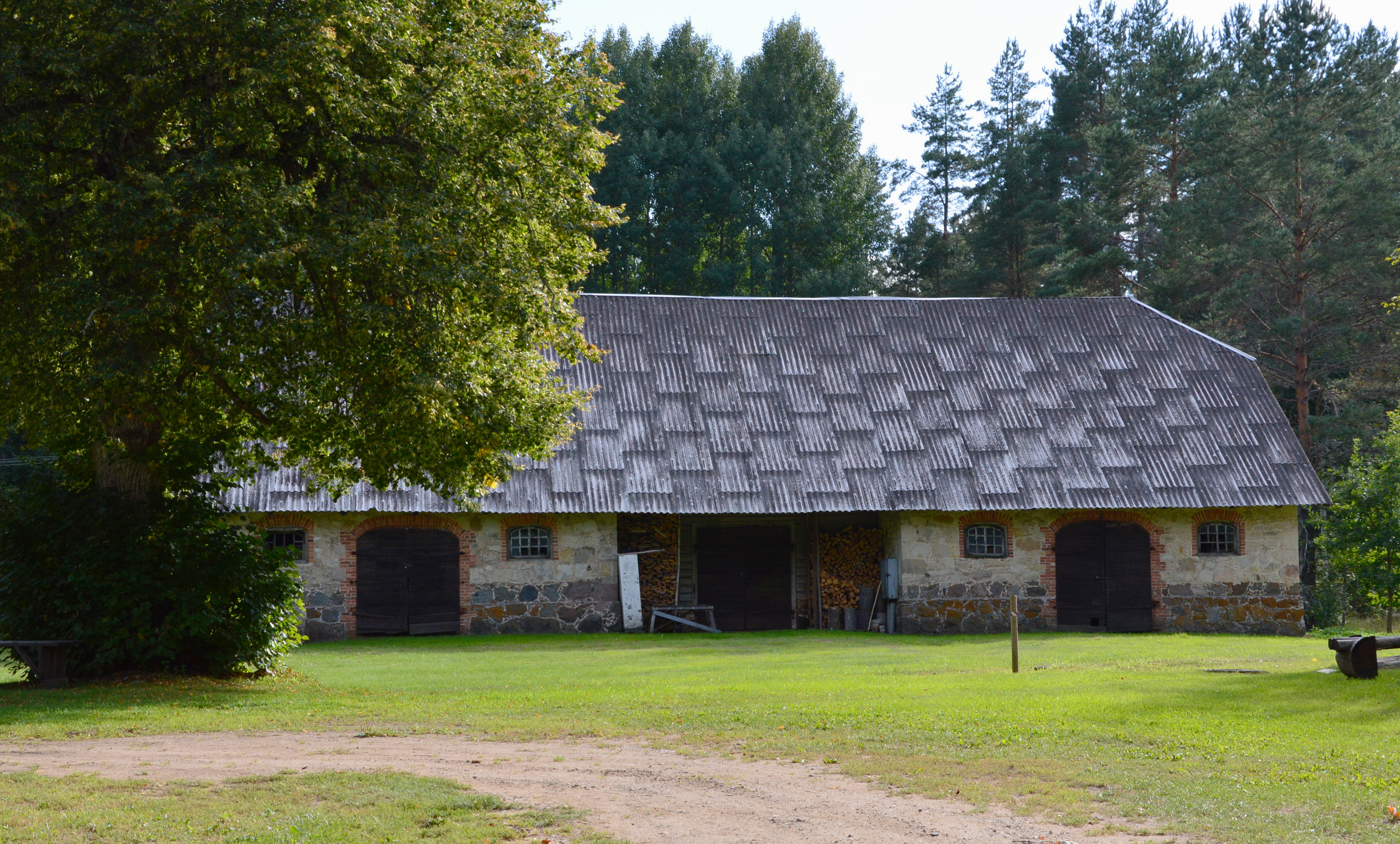 Kalli postijaama tall-tõllakuur